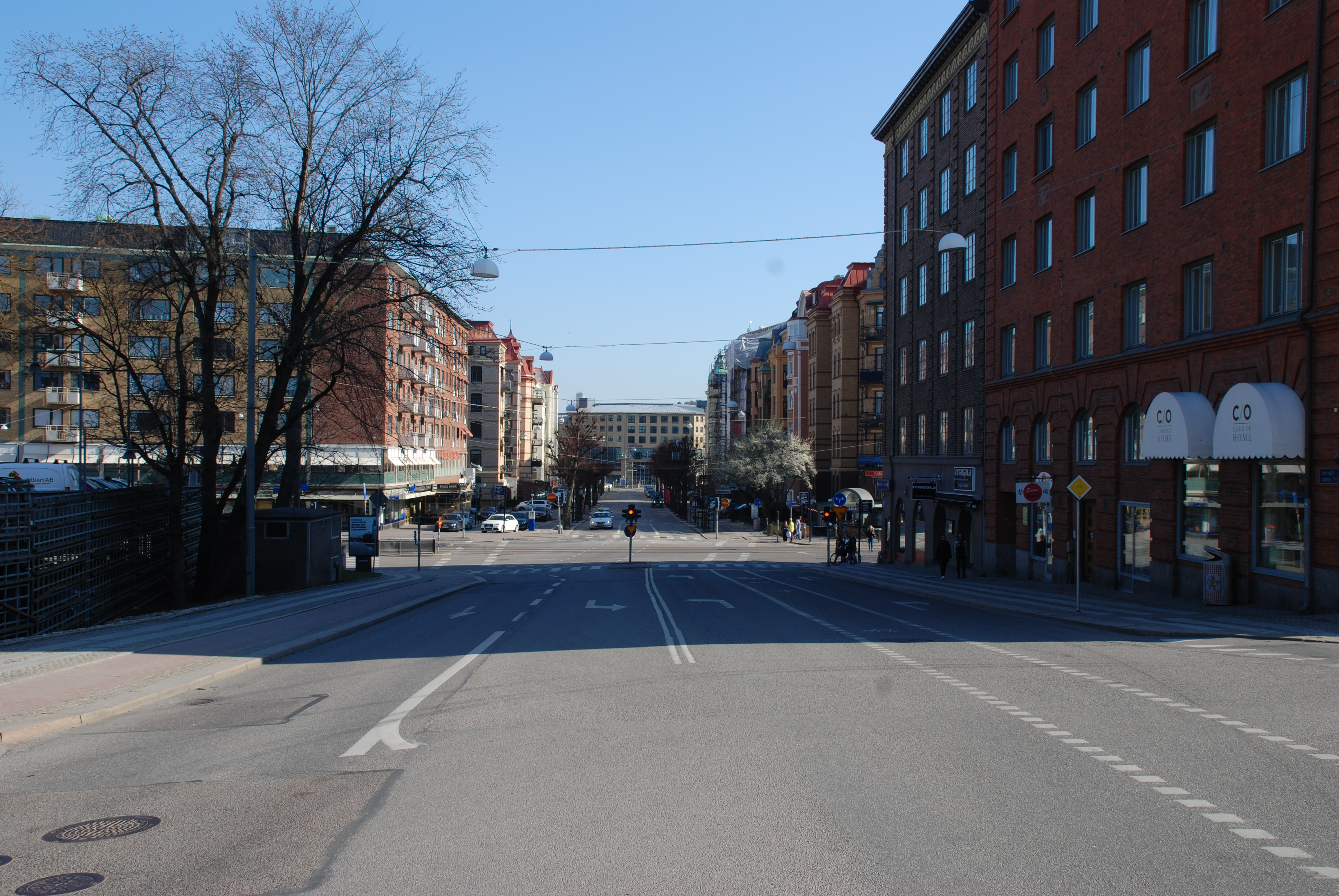 Berzeliigatan i stadsdelarna Lorensberg och Heden i Göteborg. Bilden tagen från korsningen med Johannebergsgatan i riktning österut mot Södra Vägen och Skånegatan.